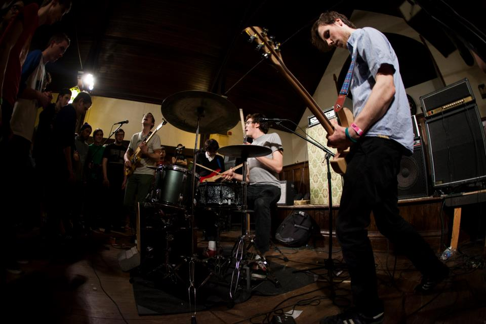 Dowsing ao vivo em chicago